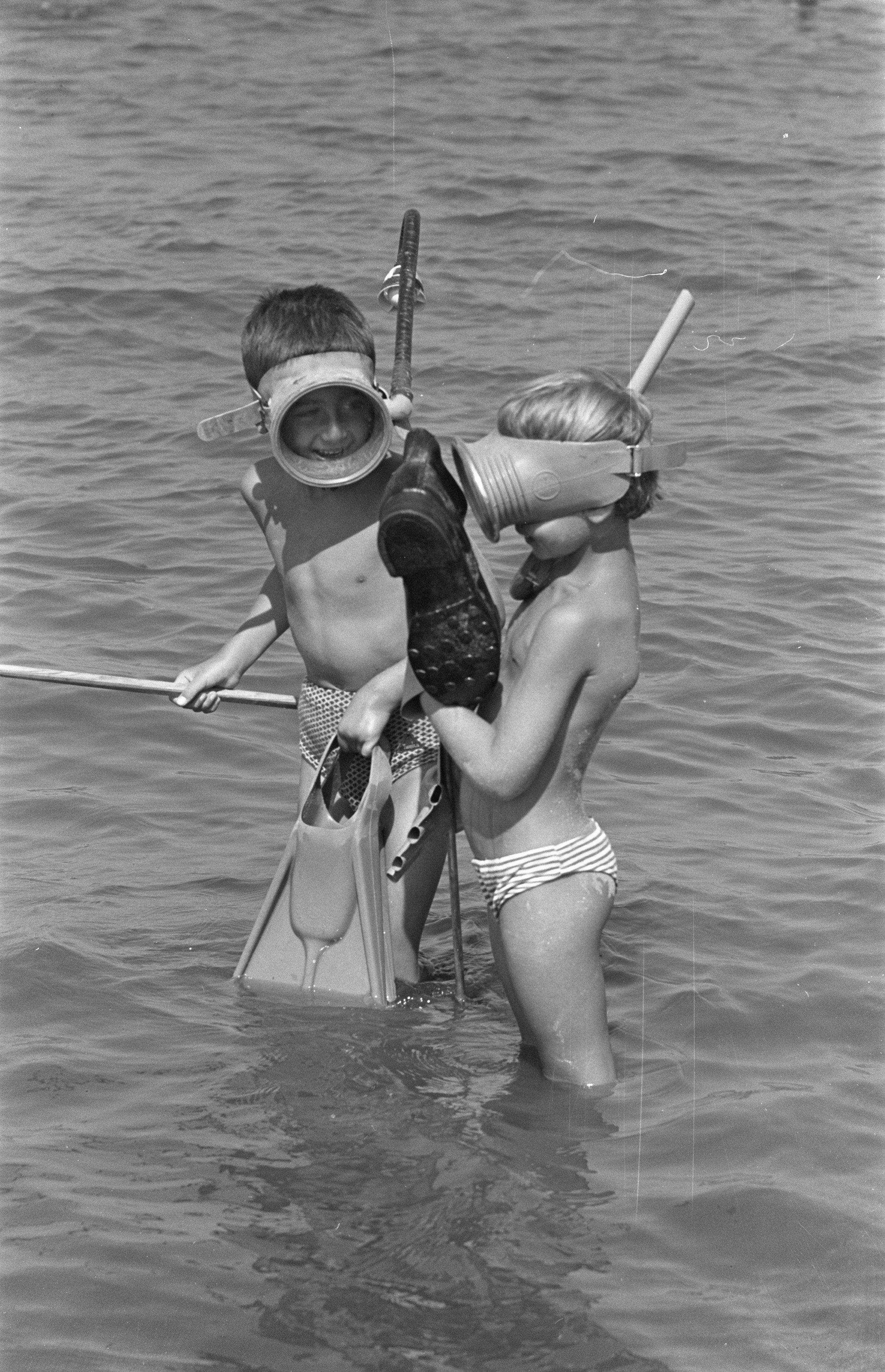 Collectie / Archief : Fotocollectie Anefo Reportage / Serie : [ onbekend ] Beschrijving : Zwemmen langs het Noordzeestrand met snorkel en zwemvliezen Datum : 20 augustus 1959 Fotograaf : Pot, Harry / Anefo Auteursrechthebbende : Nationaal Archief Materiaalsoort : Negatief (zwart/wit) Nummer archiefinventaris : bekijk toegang 2.24.01.05 Bestanddeelnummer : 910-6175